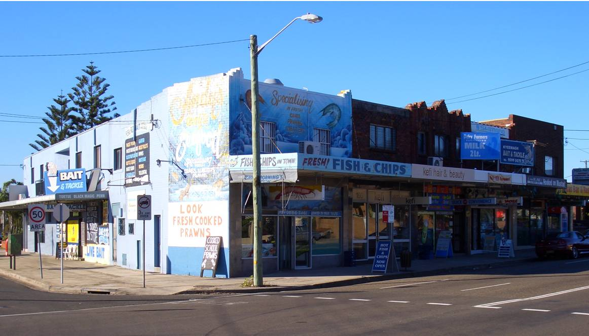 Kyeemagh, Sydney